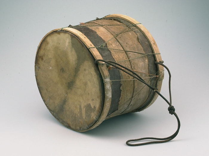 De trommel (of drum) hoort bij de gnawamuziek. Gnawa is de muziek van een zwarte bevolkingsgroep in Marokko. Het zijn merendeels afstammelingen van de slaven die door diverse Marokkaanse vorsten uit de landen bezuiden de Sahara naar Marokko gebracht zijn. Ook wordt wel aangenomen dat de zwarte bevolkingsgroepen, met name in het Zuiden, deels tot de oorspronkelijke bewoners van Marokko behoren en niet allen uit Afrika als slaven meegebracht zijn (info Mohammed Saadouni, 2004). Behalve als muziekstijl wordt de gnawamuziek gekenmerkt door zijn rituelen, zoals de derdeba (trance) die op een bepaalde nacht (leila) plaatsvindt waarbij geesten en heiligen (Mloek) worden aangeroepen tijdens het spelen van de muziek. De gnawamuziek is sterk verbonden met het islamitisch geloof. Zo vereren de leden van de gnawabroederschap een gemeenschappelijke heilige, Sidna Bilal. DIt was een zwarte metgezel van de profeet Mohammed en de eerste gebedsoproeper (muezzin) in de islamitische geschiedenis. Daarnaast worden tal van maraboets en geestelijken (Mloek) vereerd, deze kunnen met het islamitisch geloof of met de Afrikaanse cultuur (zoals de Bambara-cultuur uit Mali) verbonden zijn. De gnawamuziek kent zowel Arabische als Berbertalige varianten. De Arabische variant wordt voornamelijk in steden als Essaouira, Fes, Meknes en Marrakech gespeeld. Er wordt gebruik gemaakt van de volgende instrumenten: gunbri (snaarinstrument), kleppers en trommels. De kleding van de groep in de stad is veelkleurig (groen, zwart, rood, wit). De Berbertalige variant vindt men in sommige plattelandsregio's als de Sous en de Draa-vallei. In de Berbergnawamuziek gebruikt men twee instrumenten; de cylindervormige trommel (ganga in het Berbers) en kleppers, maar geen gunbri (snaarinstrument). De kleding bestaat uit een wit gewaad (aqshab). De gnawa komen bijeen tijdens moussems (heiligenfeesten) waarbij muziek, dans en rituelen opgevoerd worden (Jereb, 1996, p.147).